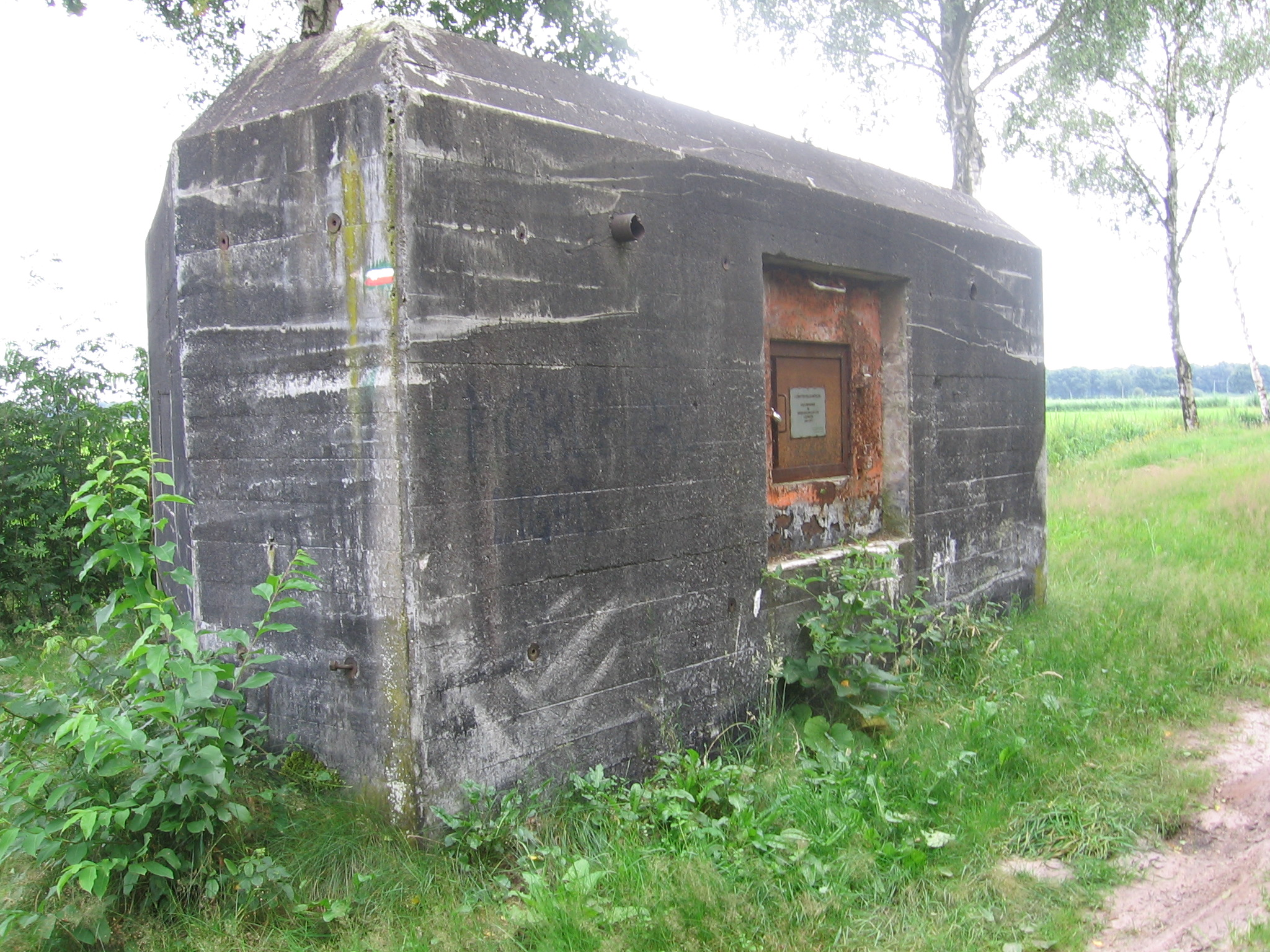 Overblijfselen van een kazemat nabij Griendtsveen aan het Defensiekanaal, deel van de Peel-Raamstelling